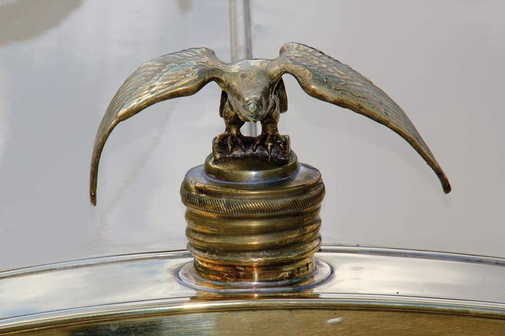 1908 Adler 6-12 offen_IMG_1083